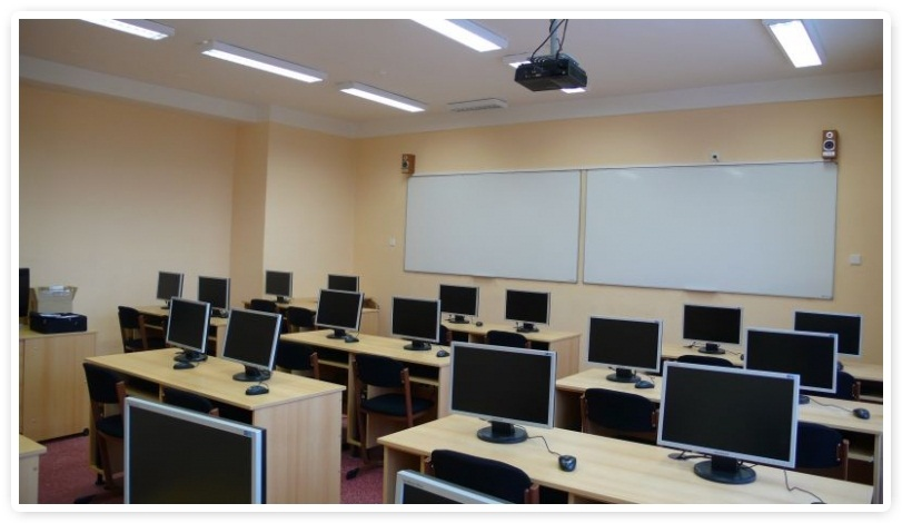 Učebna IKT na SPŠE V Úžlabině